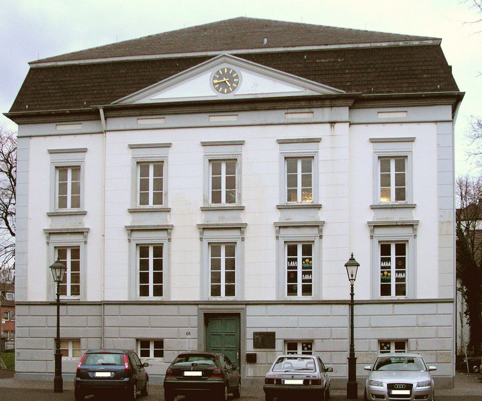 Aldenhoven, Gedenktafel am Ludwig-Gall-Haus für den gleichnamigen “Retter des Moselweinbaus”